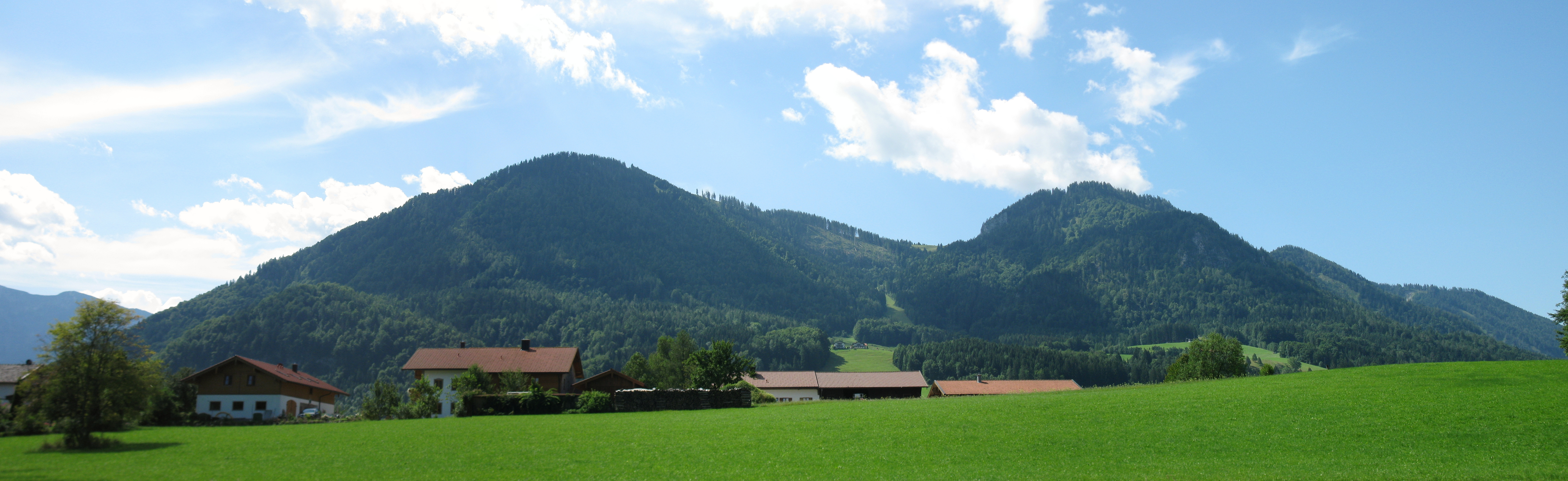 Blick von Ruhpolding auf den Unternberg